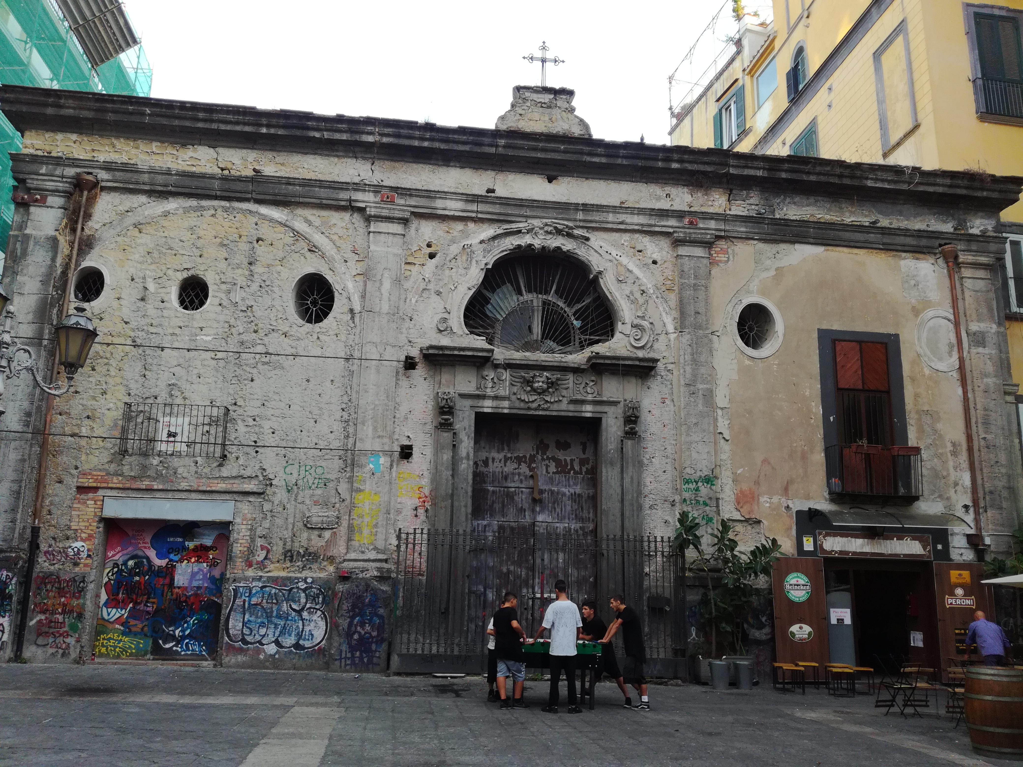 Facciata della Chiesa dei Santi Cosma e Damiano (Napoli)